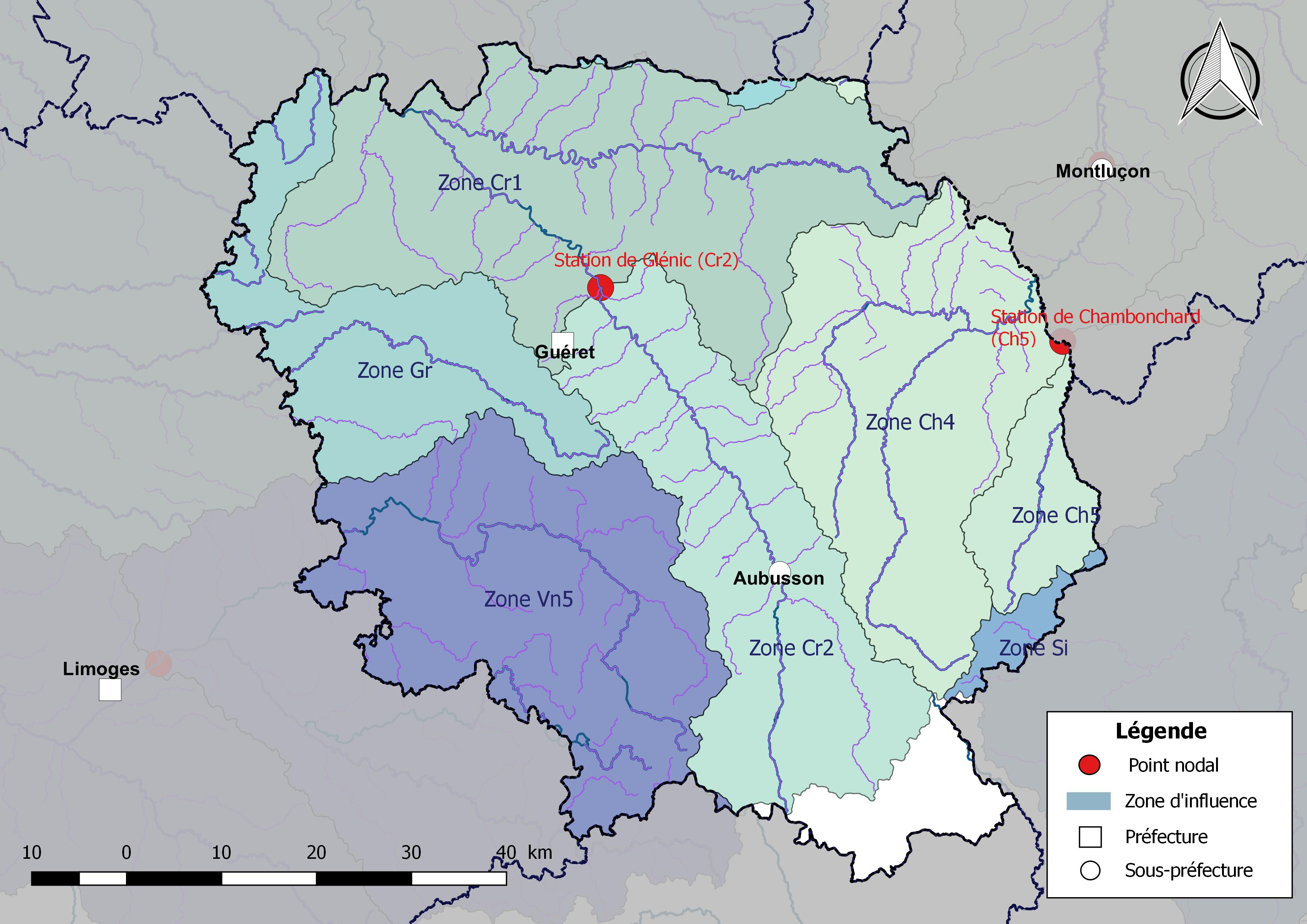 Carte des zones d'influence des points nodaux dont dépend le département de la Creuse (France).